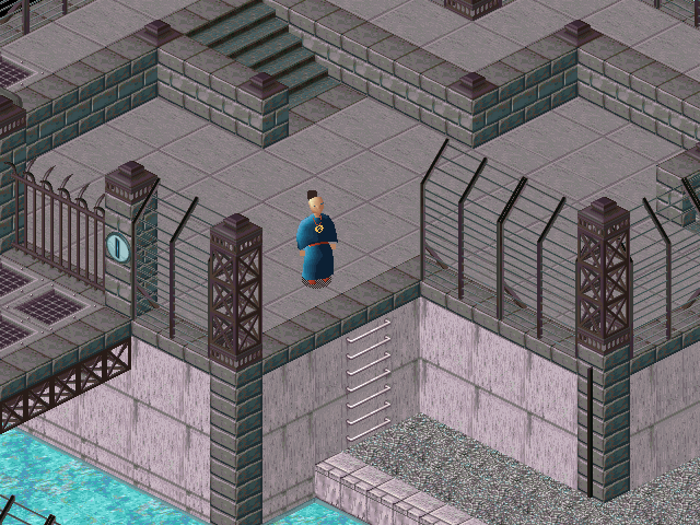 Capture d'écran du jeu vidéo Little Big Adventure (1994), développé par Adeline Software International.